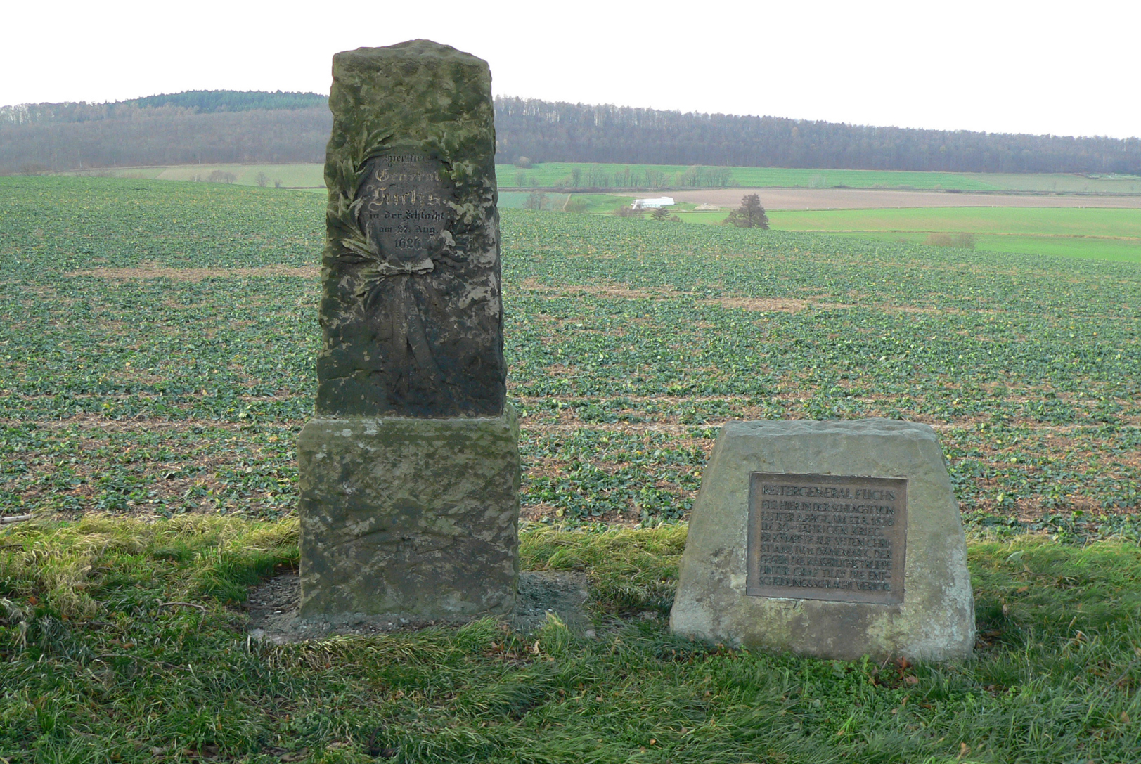 Schlacht bei Lutter, Denkmal an B 248 am Schlachtgelände